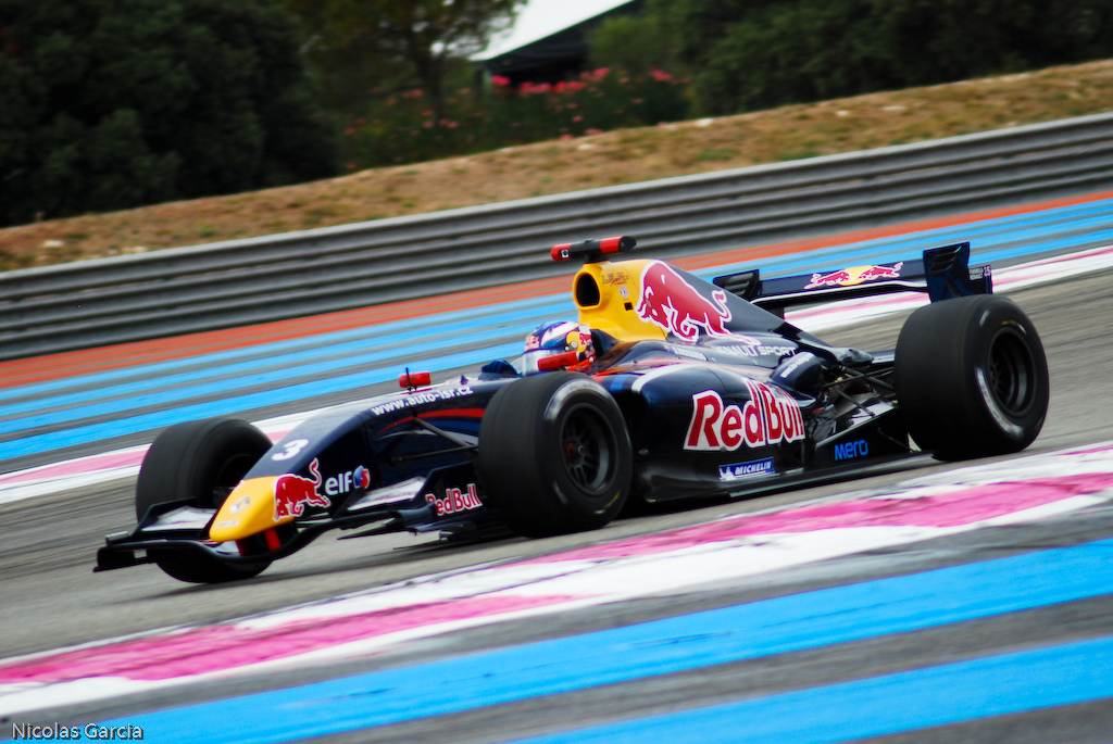 3 Daniel Ricciardo - ISR - 2011 Formula Renault 3.5 Series - Circuit Paul Ricard - Race 2